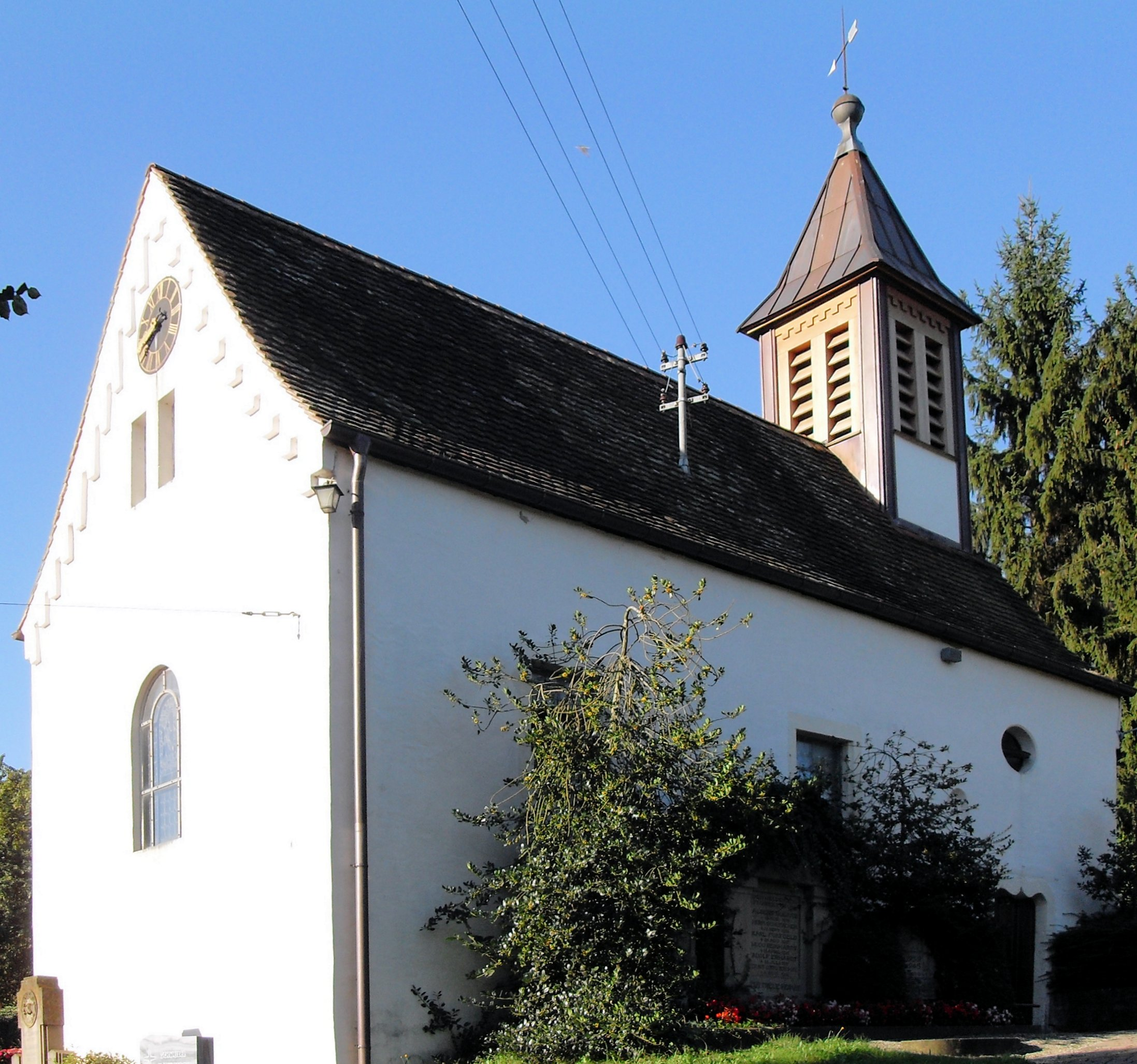 Nordostseite der Evangelischen Kirche in Zunzingen